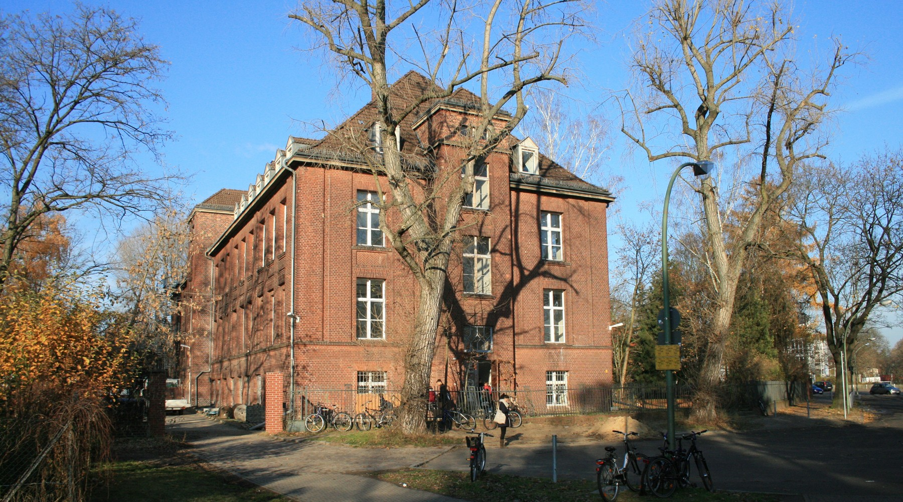 Berlin-Tegel, Ziekowstraße 161-163. Grünes Haus.